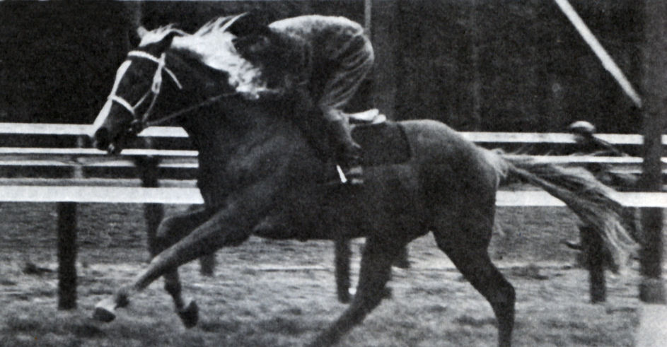 タカマガハラ（1962年）